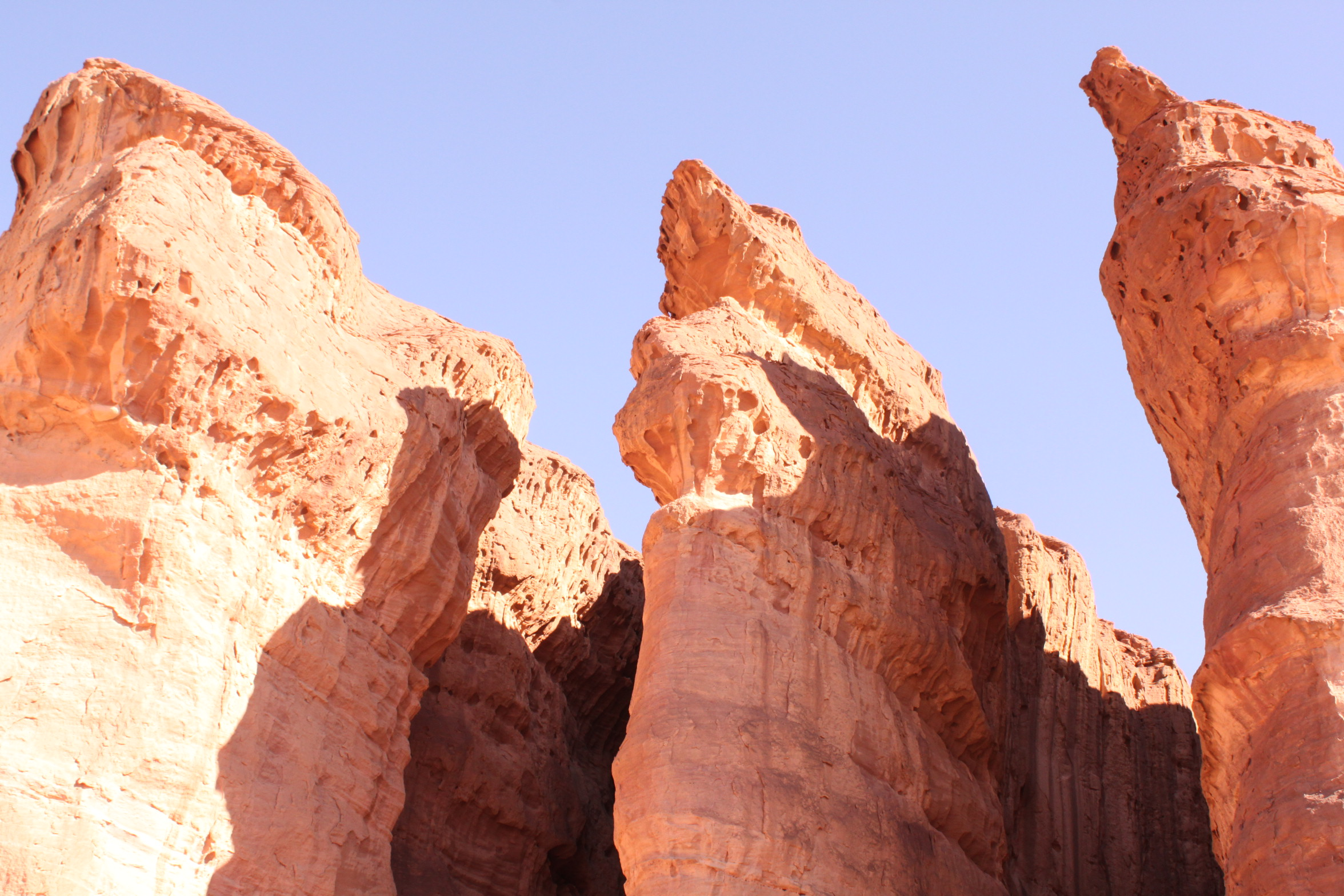 עמודי שלמה